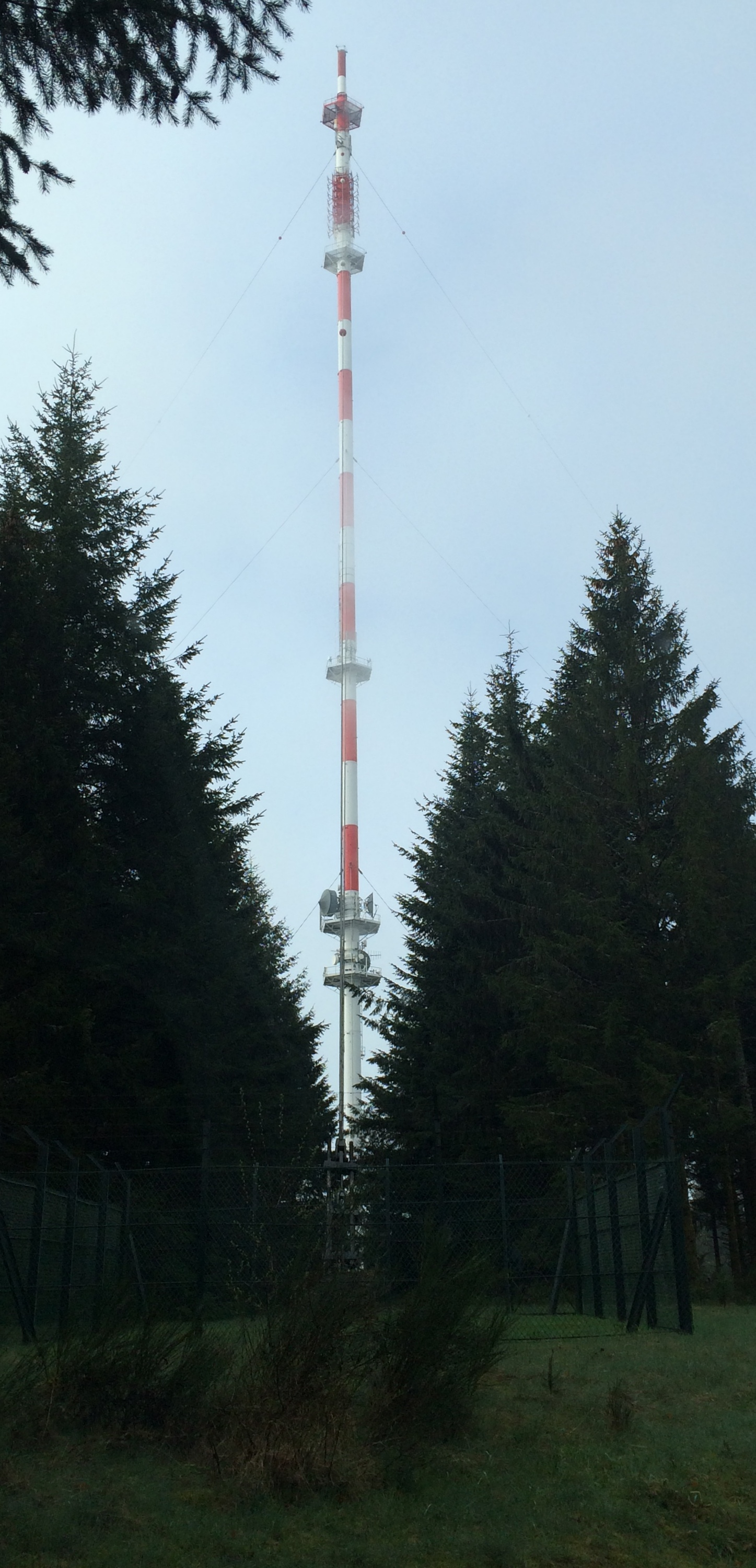 Vue de l'émeteur de la route sur le Mont Bessou.